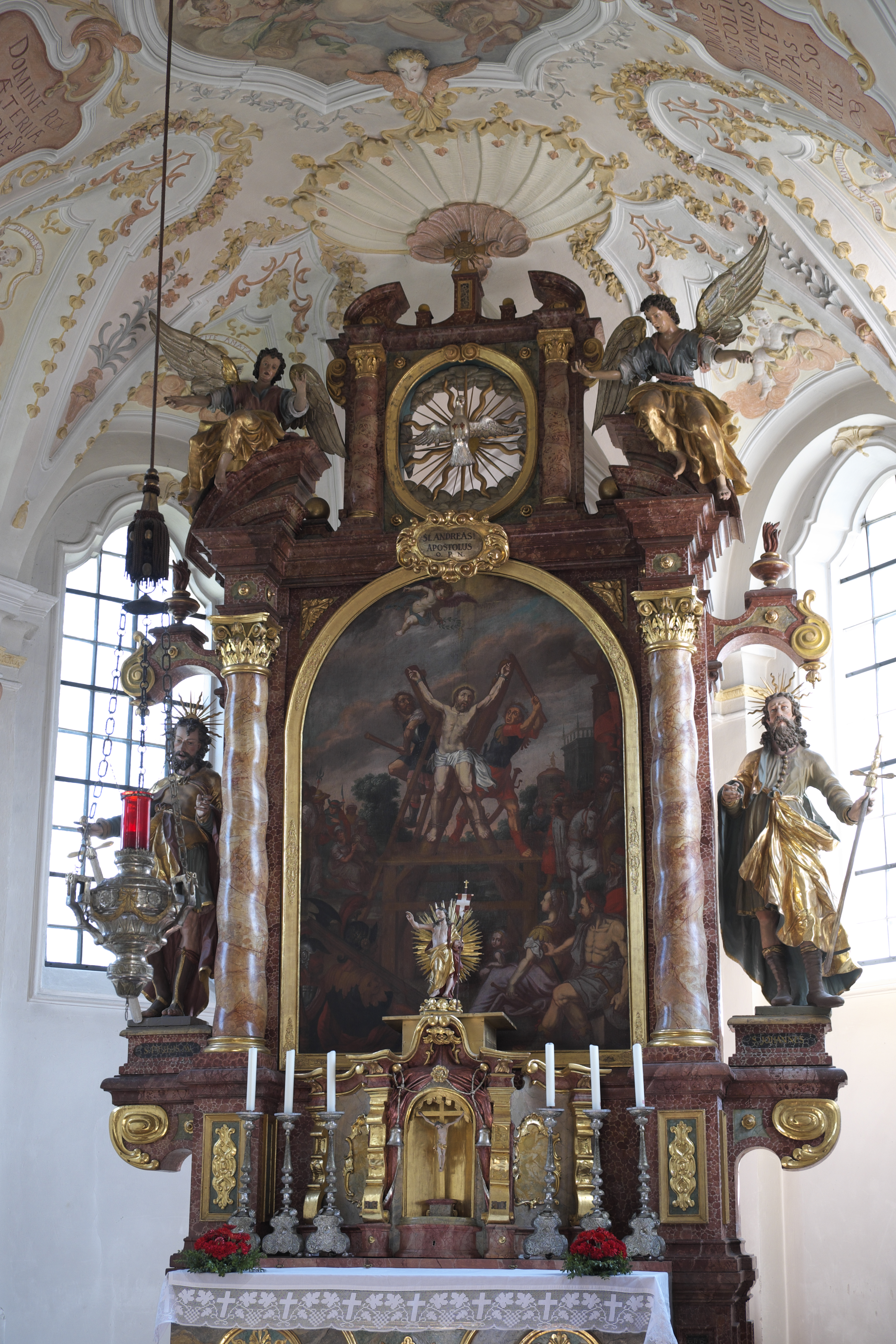 Alte katholische Pfarrkirche St. Andreas in Eching im Landkreis Freising (Bayern/Deutschland), Hauptaltar aus dem späten 17. Jahrhundert, Altarblatt mit der Darstellung der Kreuzigung des Apostels Andreas, Seitenfiguren: die Märtyrer Paulus und Johannes